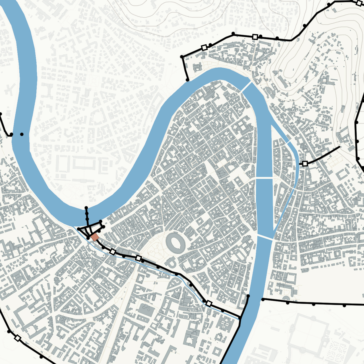 Planimetria della città di Verona con le mura e le porte urbiche principali, in rosso l'arco dei Gavi. Vedi anche Le mura di Verona di Annamaria Conforti Calcagni.